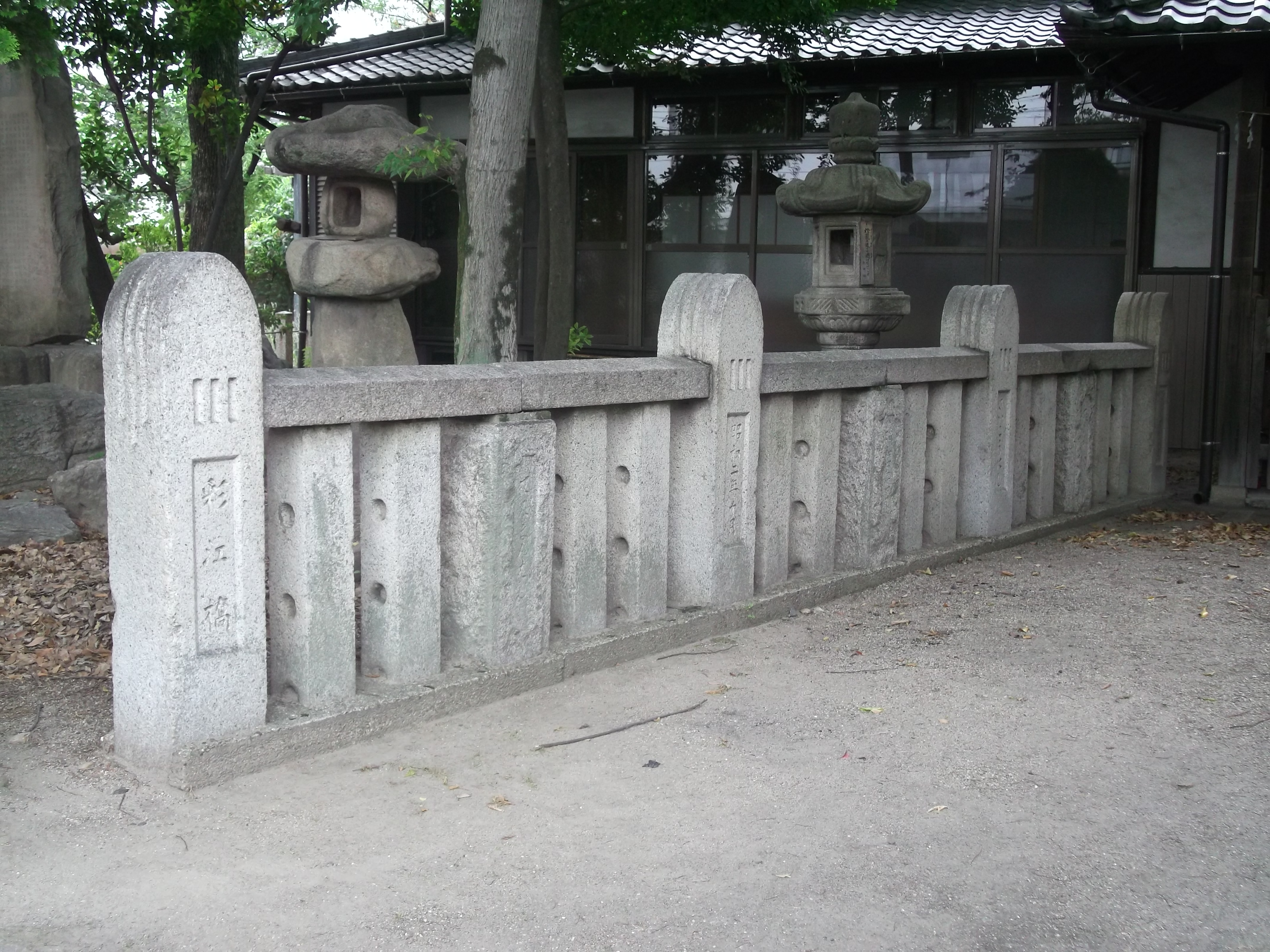 名古屋市北区下飯田町の六所社境内に残る「彩江橋」欄干を南側より写す